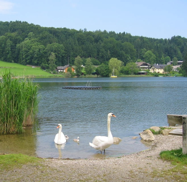 Lake Obertrum, Salzburg Photograph by Gakuro